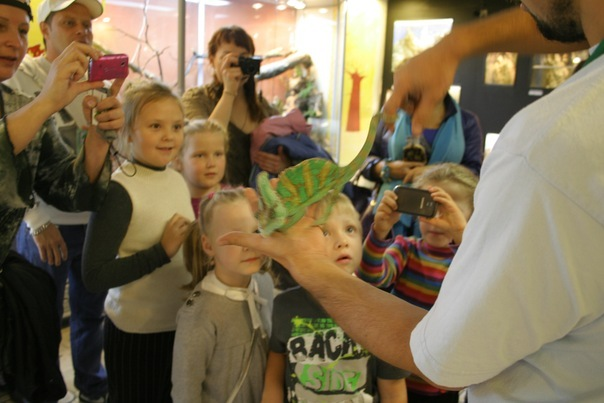 научный террариум зоомузея мгу, хамелеон